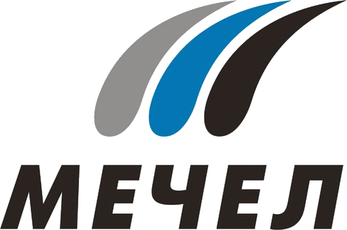 Logo des russischen Eishockeyclubs HK Metschel Tscheljabinsk (Мечел), transparent